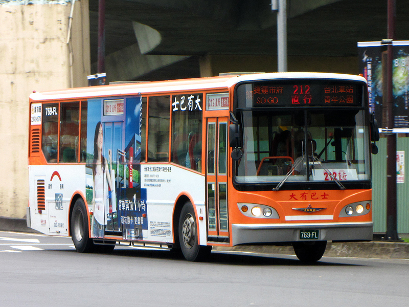 中文（台灣）: 大有巴士三菱扶桑RM117NL大客車769-FL。